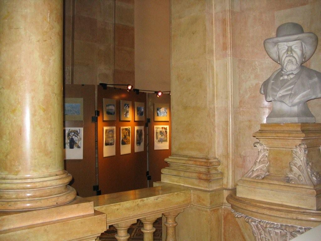 . -2006 Novembre/décembre, « Bois Sacré » Exposition de Roger Zanoni avec les photographies et les textes de Frédérique Wallet. Médiathèque de Cannes avec le CPIE (centre permanent d’initiative pour l’environnement des îles de Lérins et Pays). Cannes.